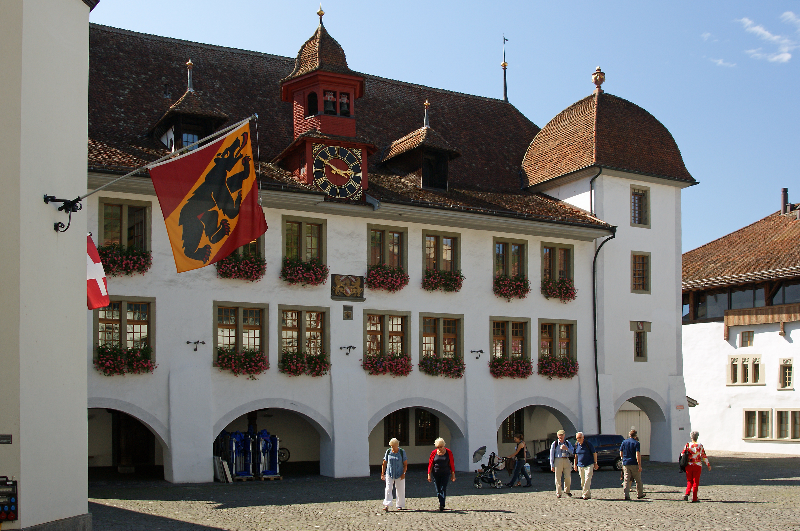 Thuner Rathaus,von der Rathausplatzseite